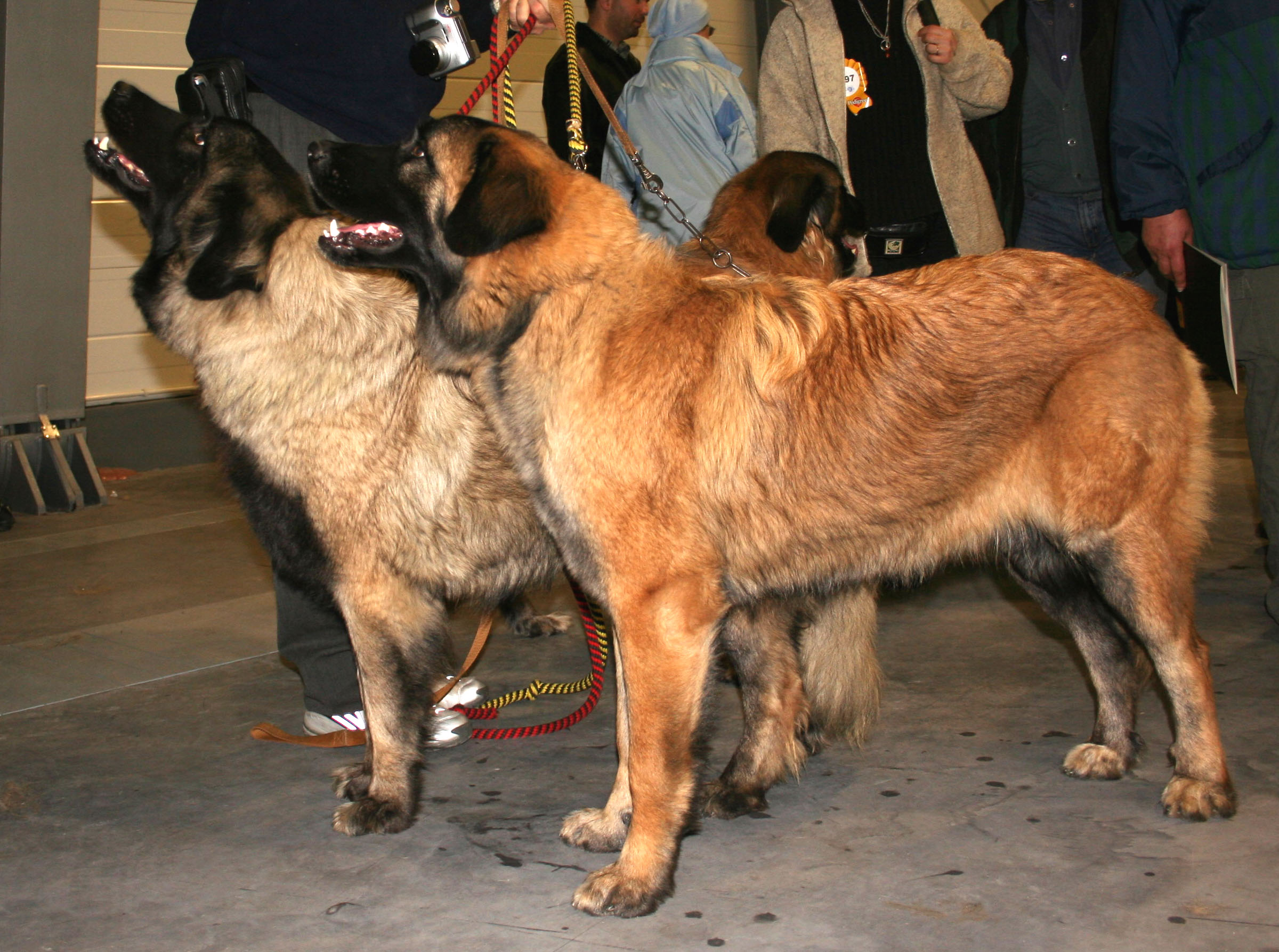 Cao_da_serra_da_estrela na Światowej Wystawie Psów Rasowych w Poznaniu